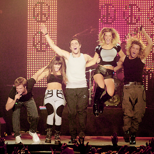 Gastón Dalmau, Lali Esposito, Peter Lanzani, China Suarez y Nico Riera.